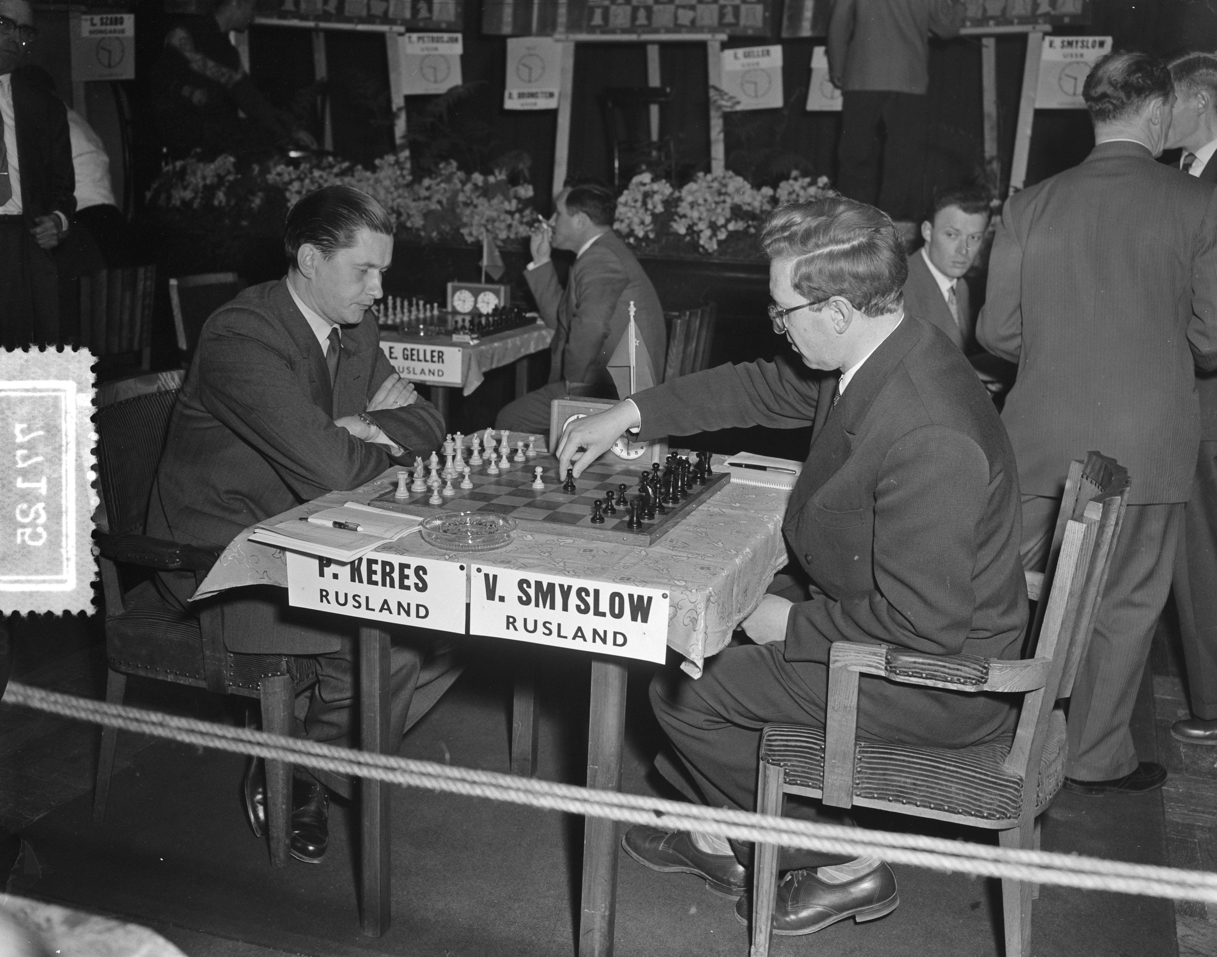 Collectie / Archief : Fotocollectie Anefo Reportage / Serie : [ onbekend ] Beschrijving : Wereldschaaktoernooi Euwe met gong. Partij Xeres tegen Smyslov Datum : 24 april 1956 Trefwoorden : PARTIJEN Persoonsnaam : Xeres Fotograaf : Pot, Harry / Anefo Auteursrechthebbende : Nationaal Archief Materiaalsoort : Negatief (zwart/wit) Nummer archiefinventaris : bekijk toegang 2.24.01.04 Bestanddeelnummer : 907-7125